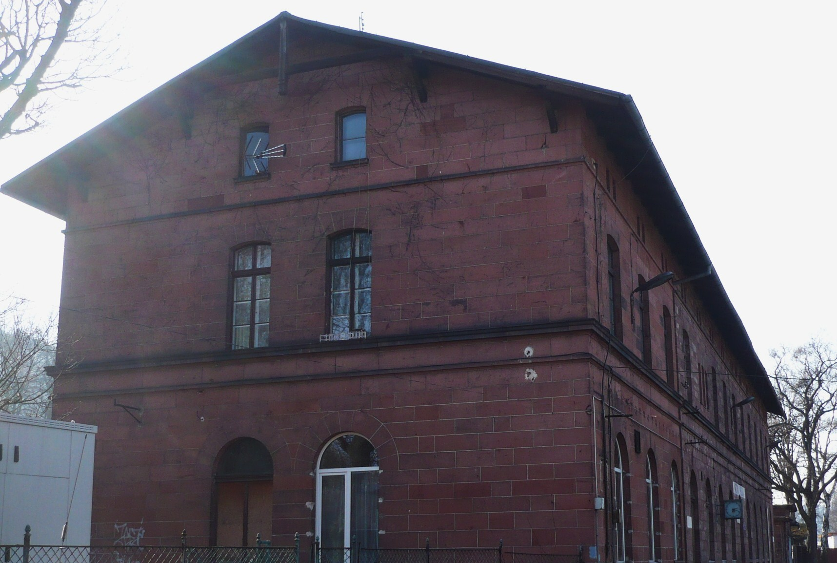 Nowa Ruda, ul. Kolejowa 24 - stacja kolejowa